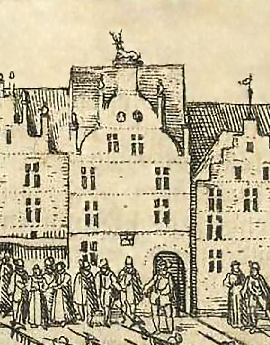 Düsseldorf, Haus "Zum Goldenen Hirsch" mit Hirsch auf dem Dach und Nachbarhäusern, am Marktplatz 1585 (Gramminaeus) (während der Hochzeit Jan Wellems), Ausschnitt